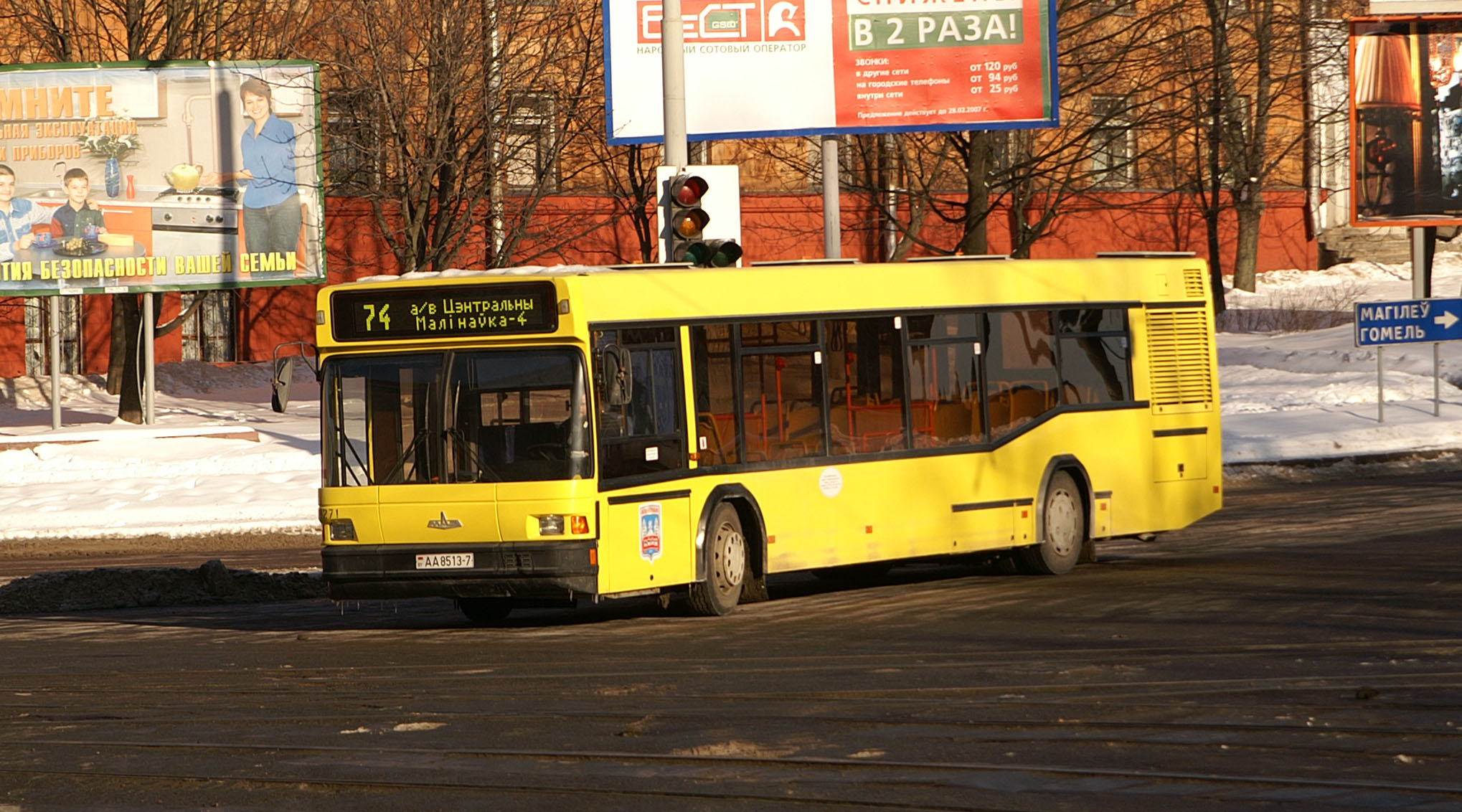 МАЗ-103 bus.